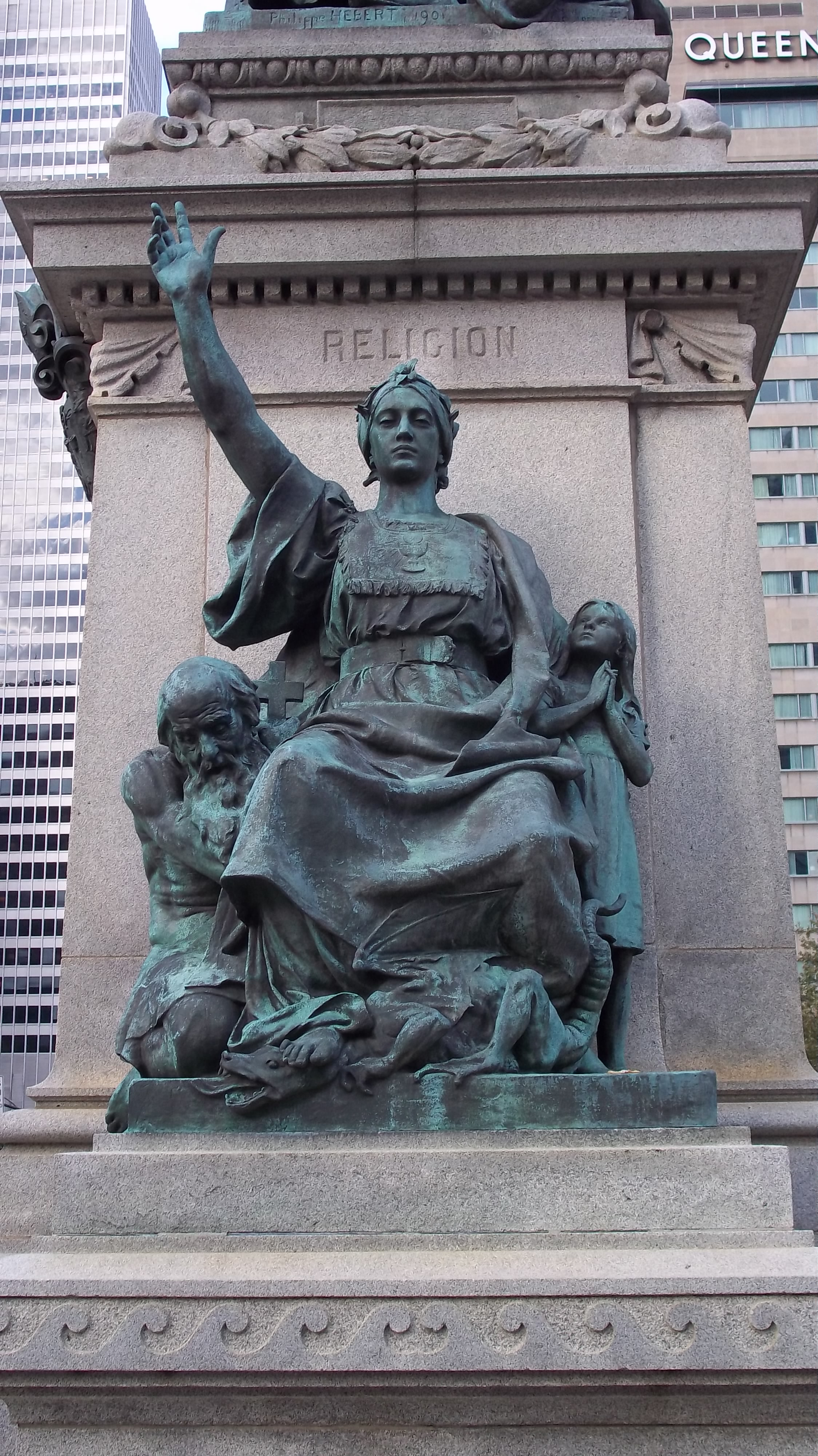 Monument à Ignace Bourget, situé devant la Basilique-cathédrale Marie-Reine-du-Monde, boulevard René-Lévesque Ouest, Montréal